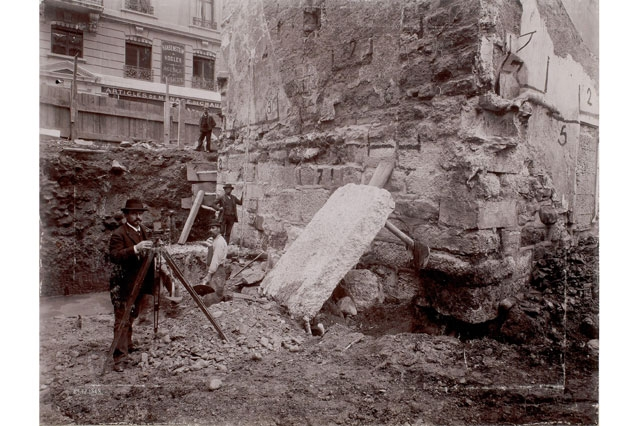 Emile Pricam (1844-1919), Fouilles archéologiques au pied de la Tour de l’Ile, côté nord, 1897, épreuve sur papier albuminé montée sur carton, 18,2 x 25,7 cm, inv. album SIG 04 88